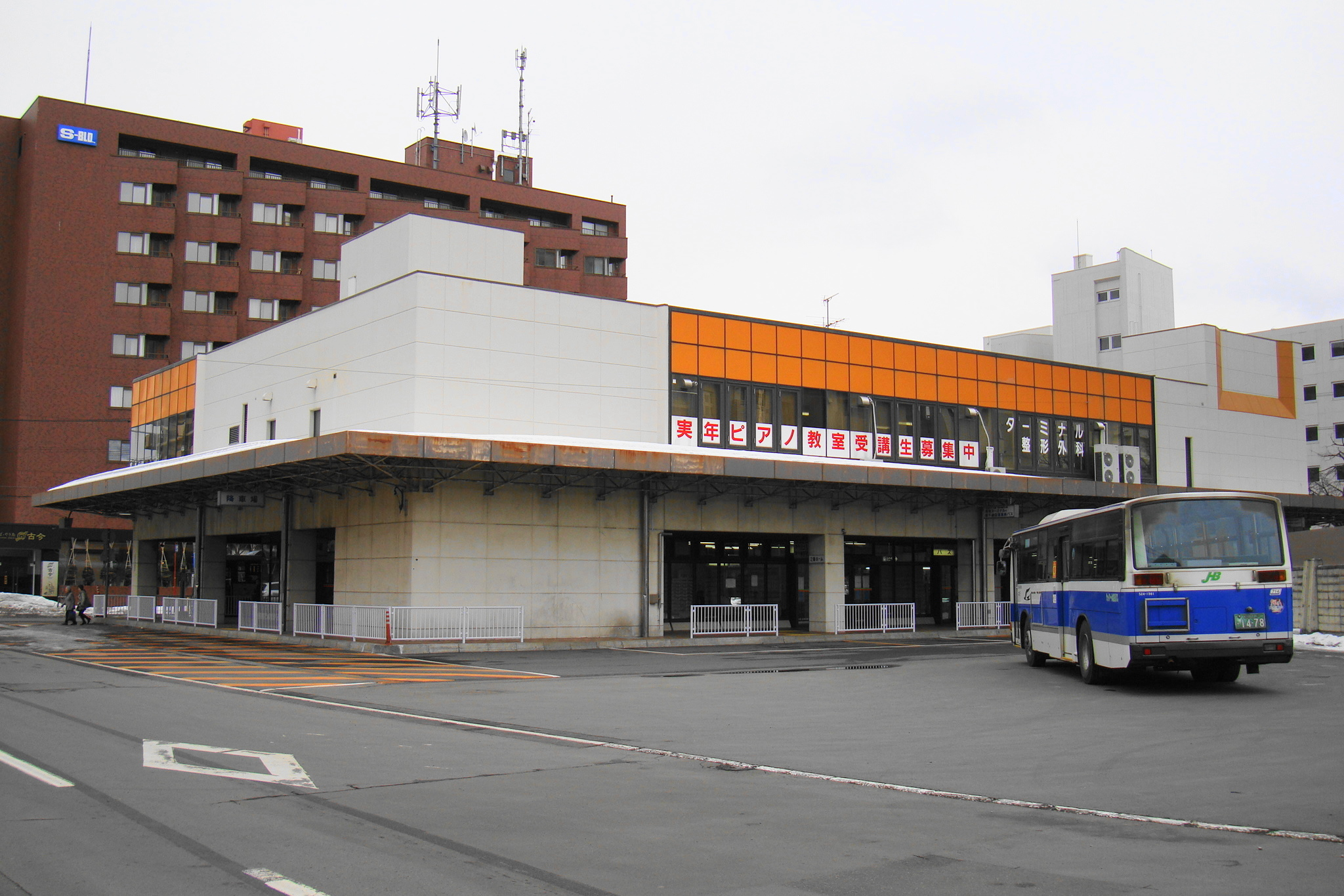 Maruyama Bus Terminal